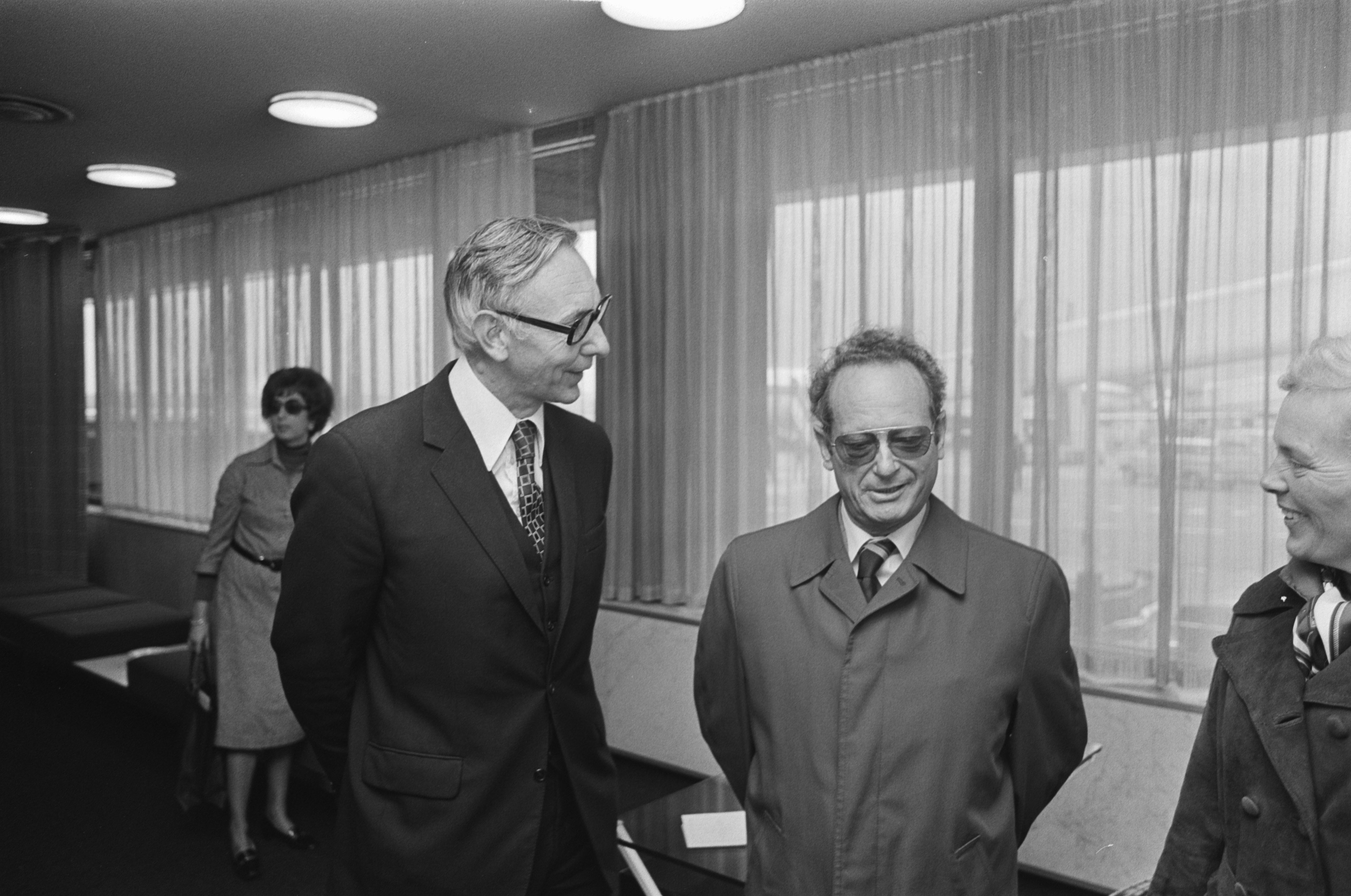 Yigal Allon (Israelische minister Buitenlandse Zaken) op Schiphol verwelkomd door Van der Stoel ; Van der Stoel begroet Allon.